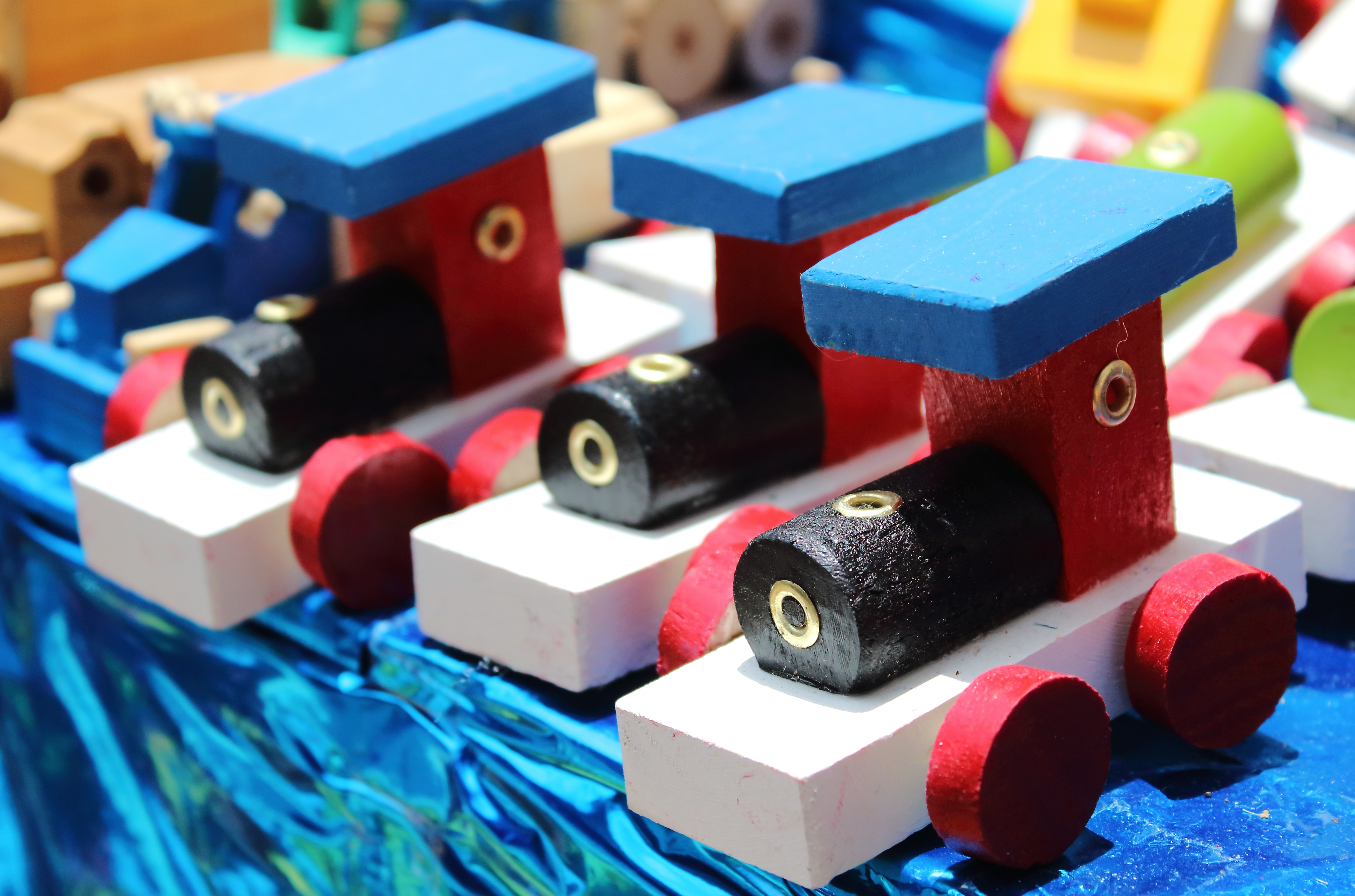 Tren hecho de madera.